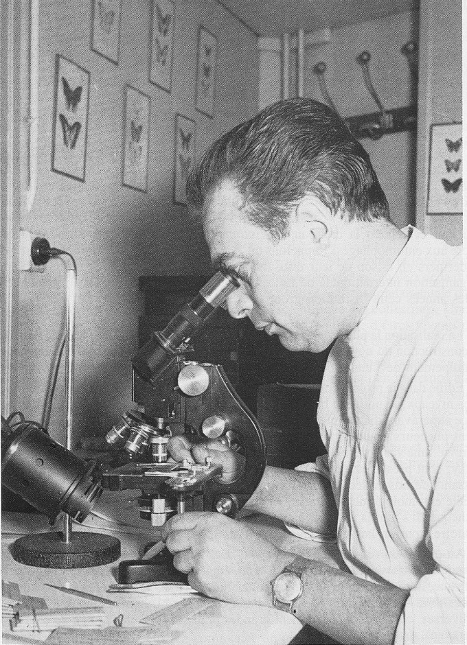 L'entomologiste Alfred-Serge Balachowsky (1901-1983) dans son laboratoire.